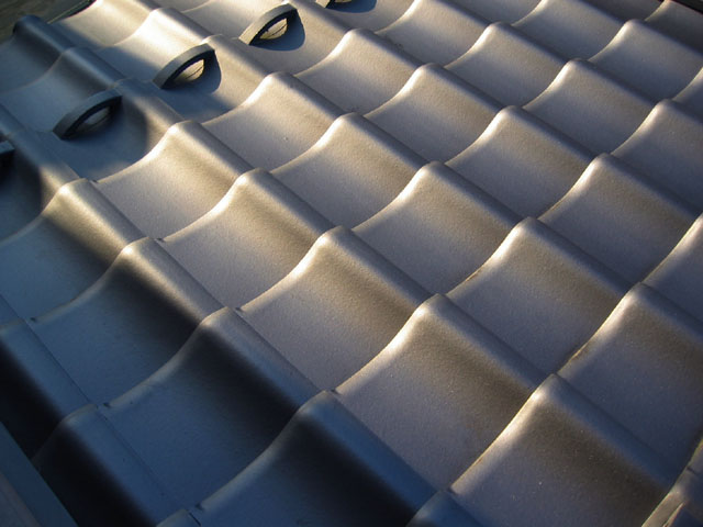 瓦 弧状の出っ張りが付いているのはja:雪止め瓦 2004年9月、Shiftが撮影 画像形式 JPEG形式 横640×縦480pixel 色数24bit (16,777,216色)